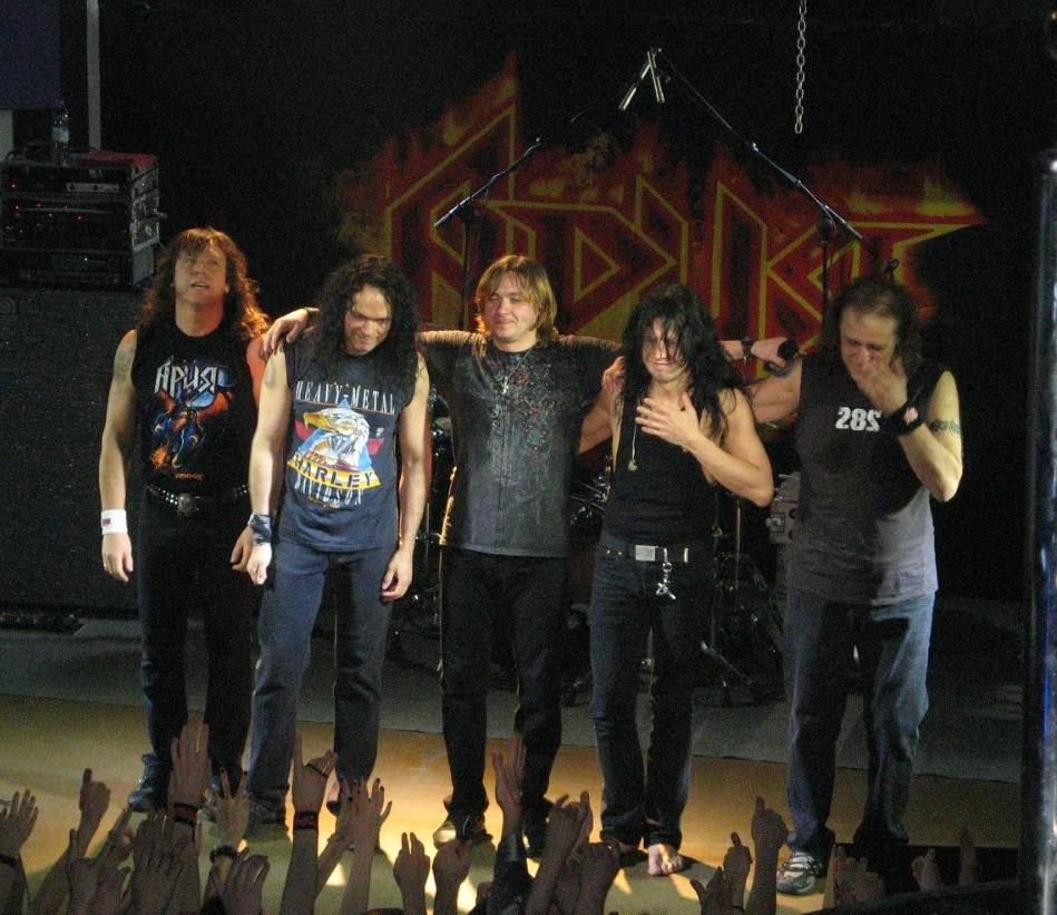 Концерт группы Ария в Томске 29.04.2012г.